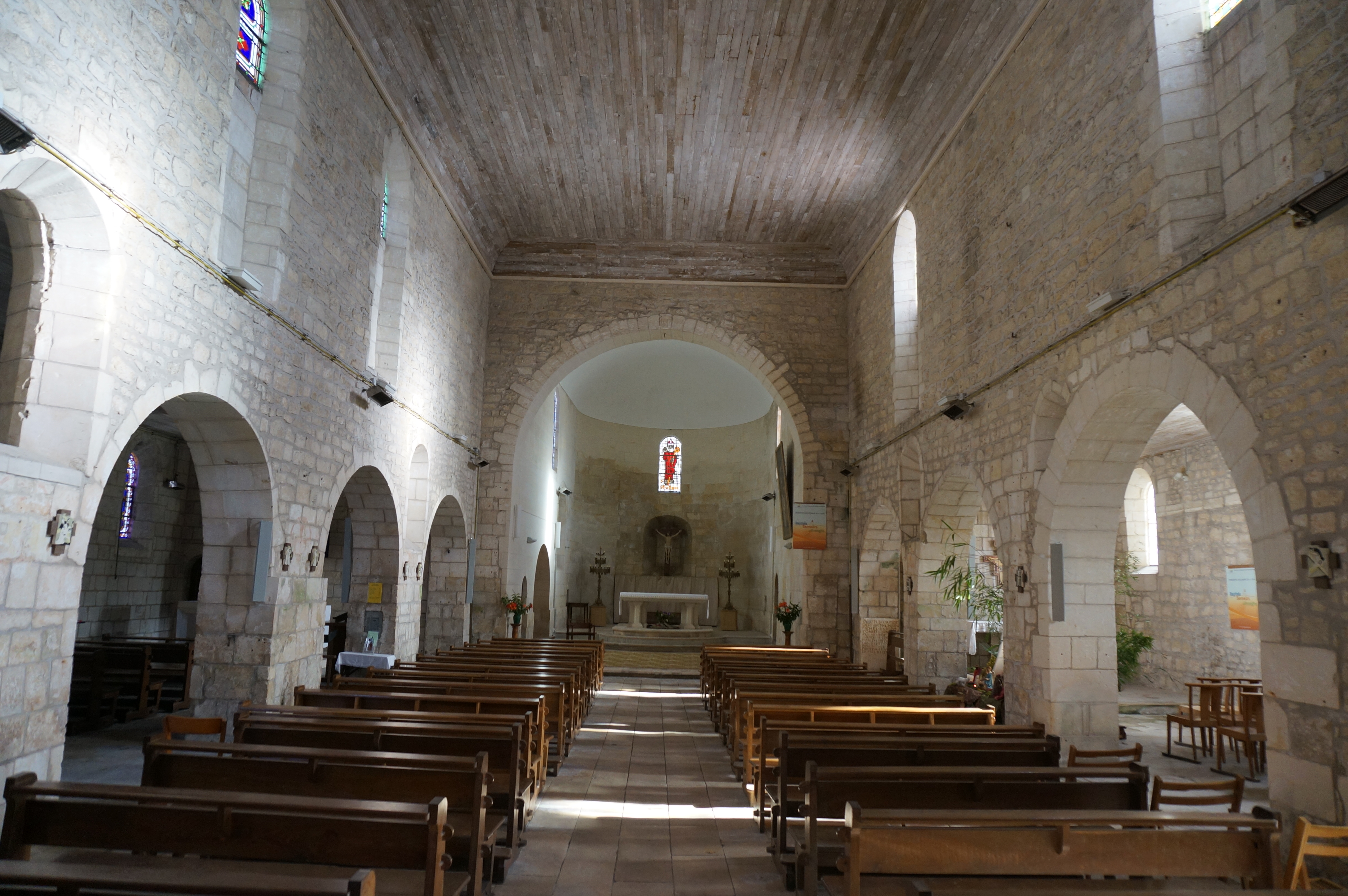 Vues de l'église.